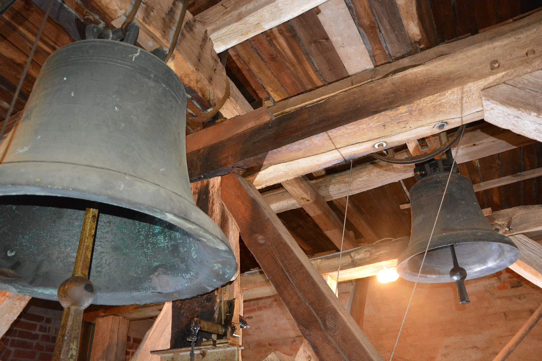 Die beiden Glocken in ihrem Zuhause.